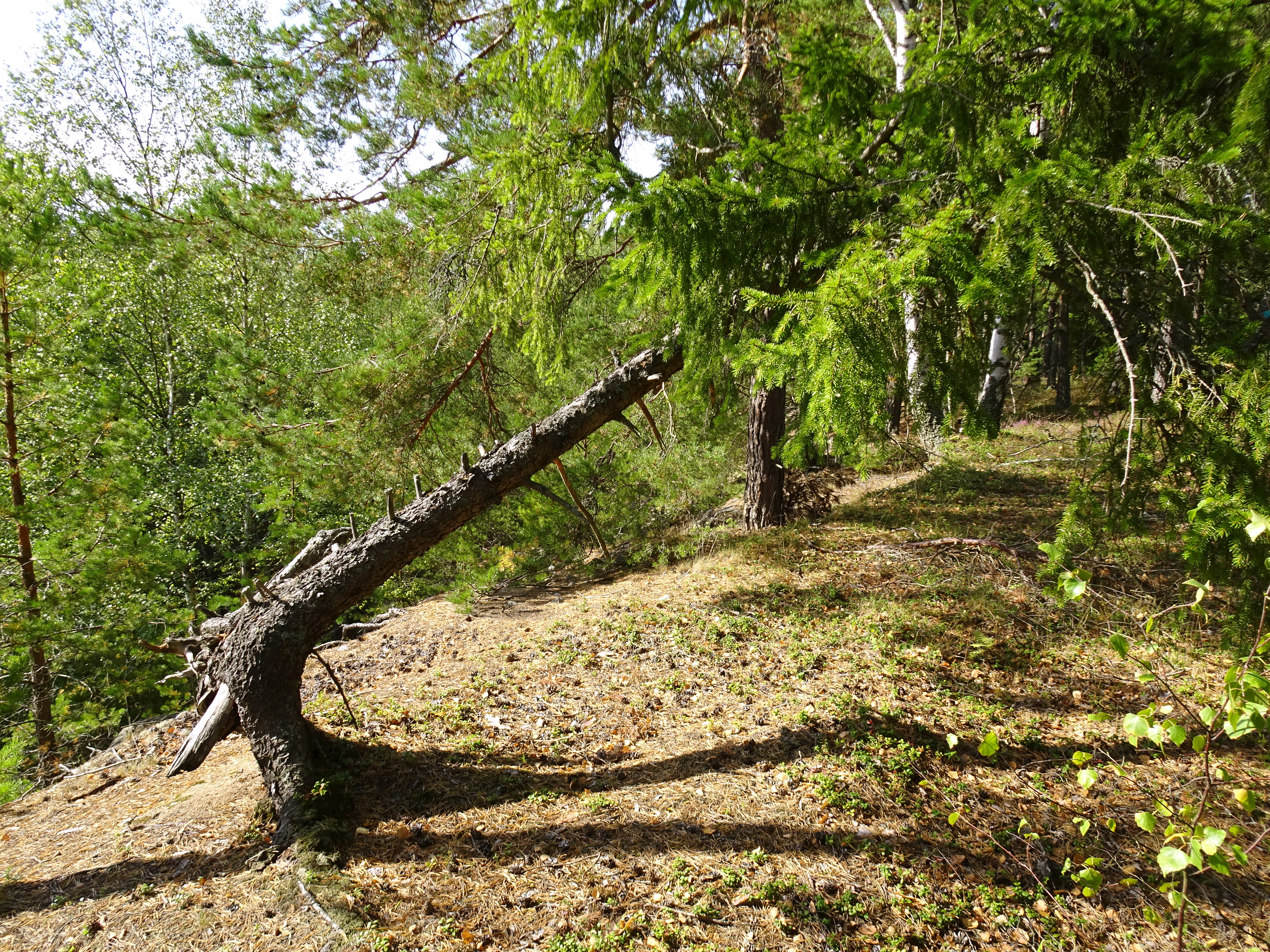 Dödisgropen vid Skytteholm på Munsön, Ekerö kommun